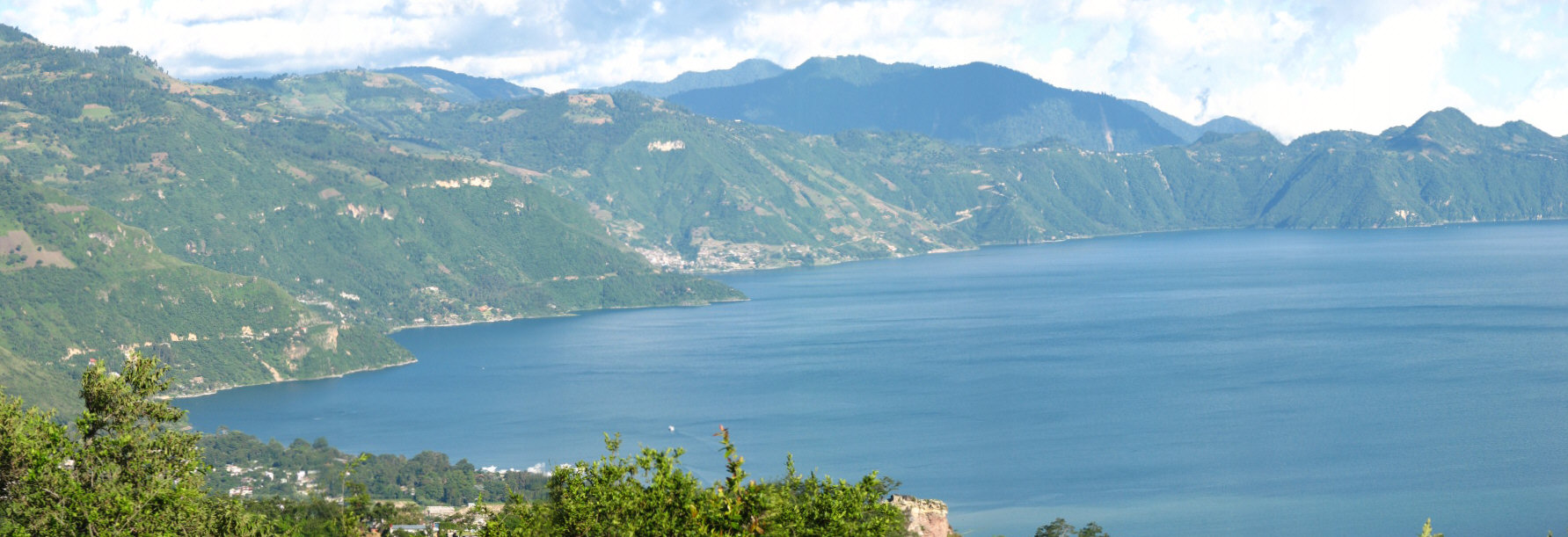 LAGO DE Atitlán, 2006, Guatemala